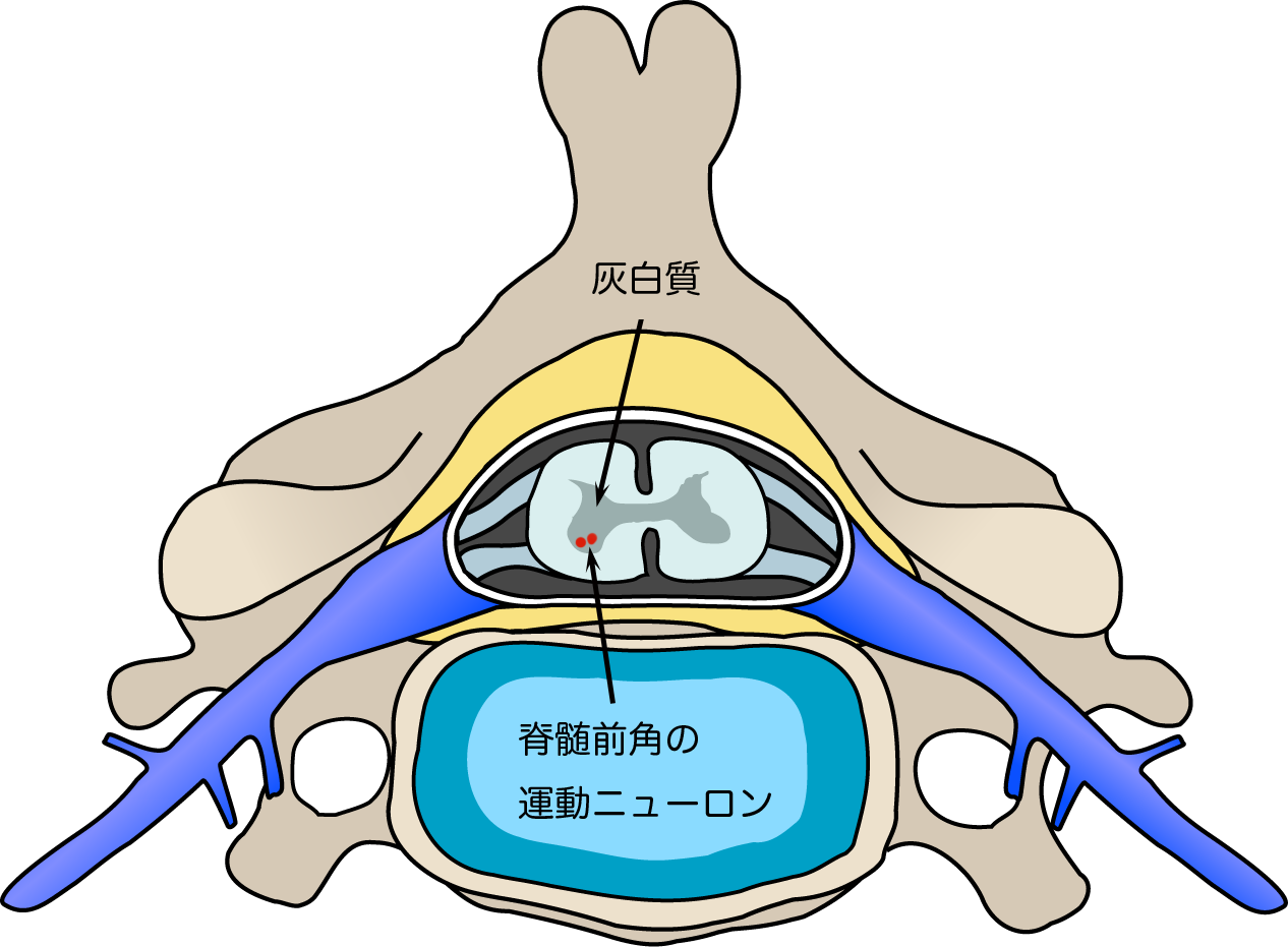 ポリオウイルスは脊髄前角の運動ニューロンを冒す。